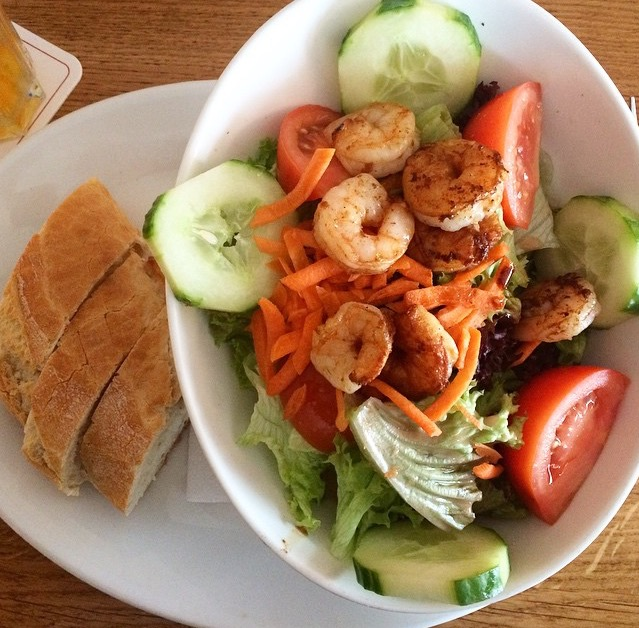 Shrimps Salat